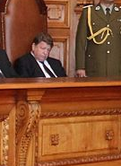 Carlos Künsemüller, ministro de la Corte Suprema de Chile